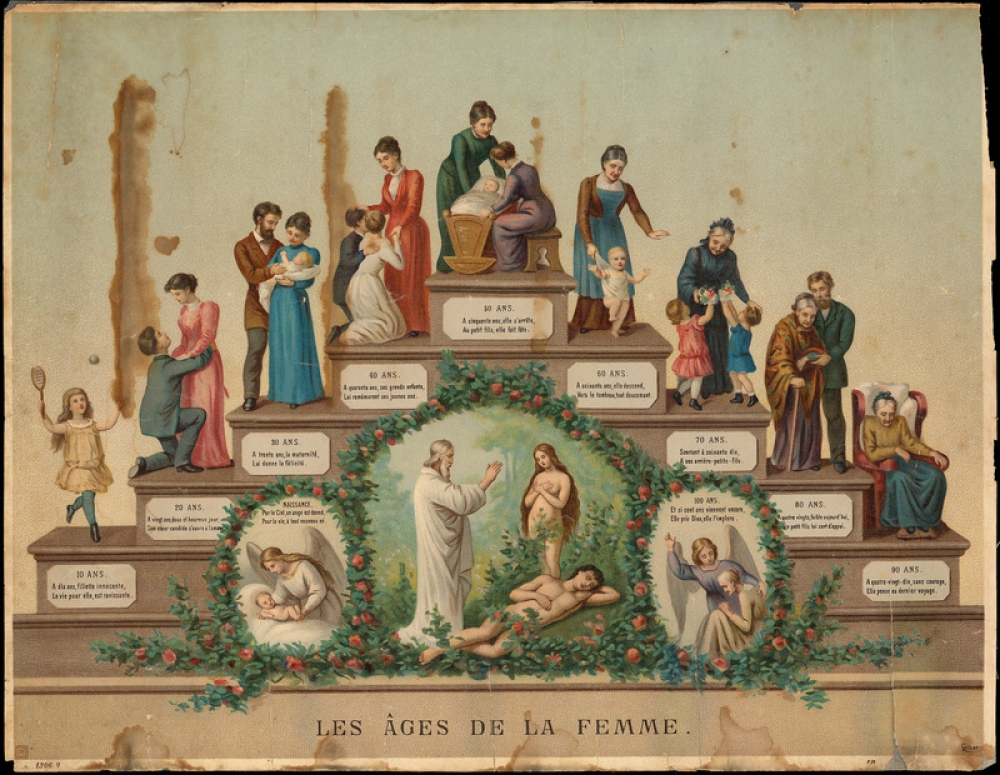 Chromolithographie de nombreuses déchirures dans le sens de la hauteur feuille tachée, de nombreuses traces brunes